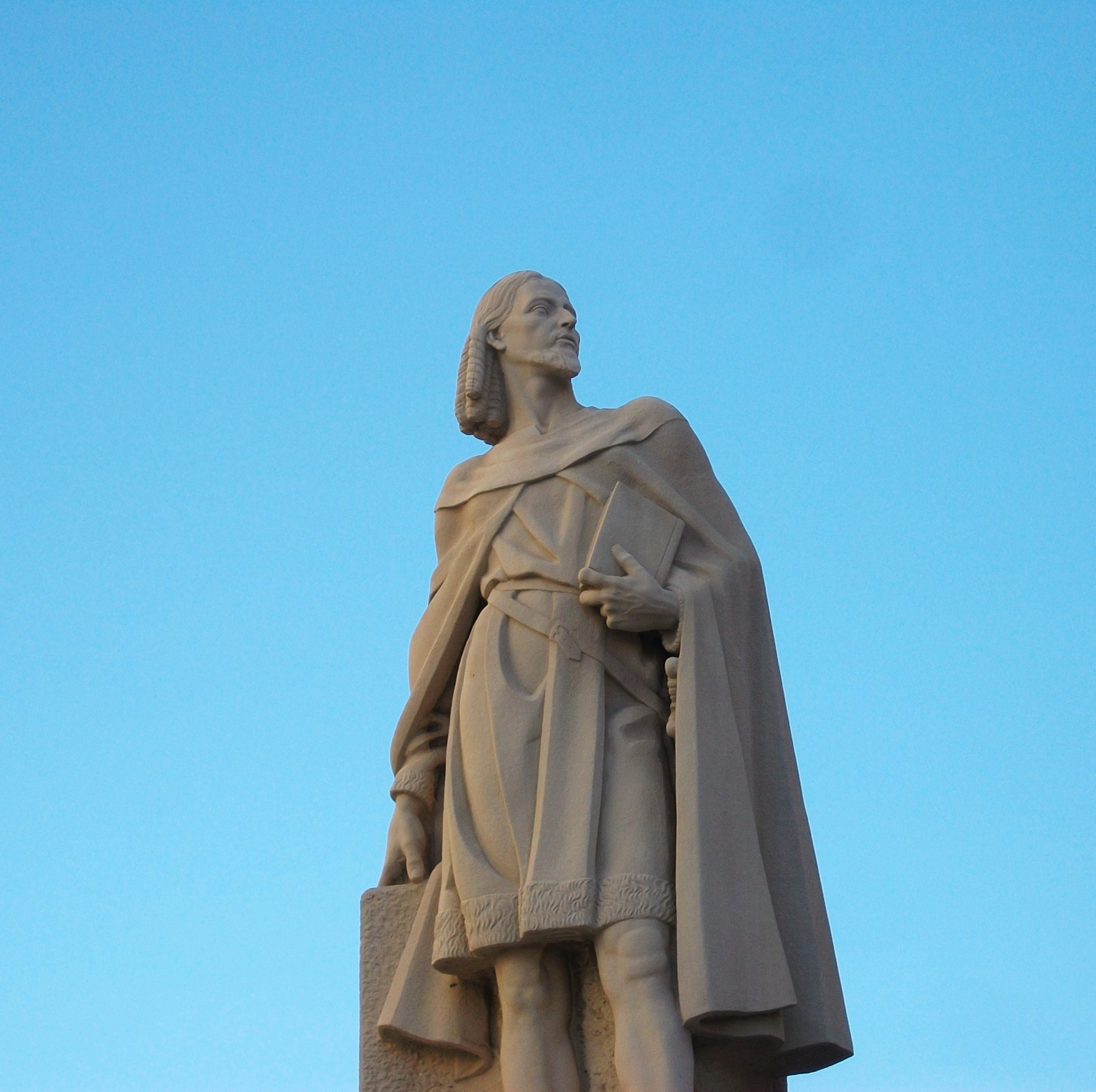 Estàtua d'Ausiàs March a Gandia.